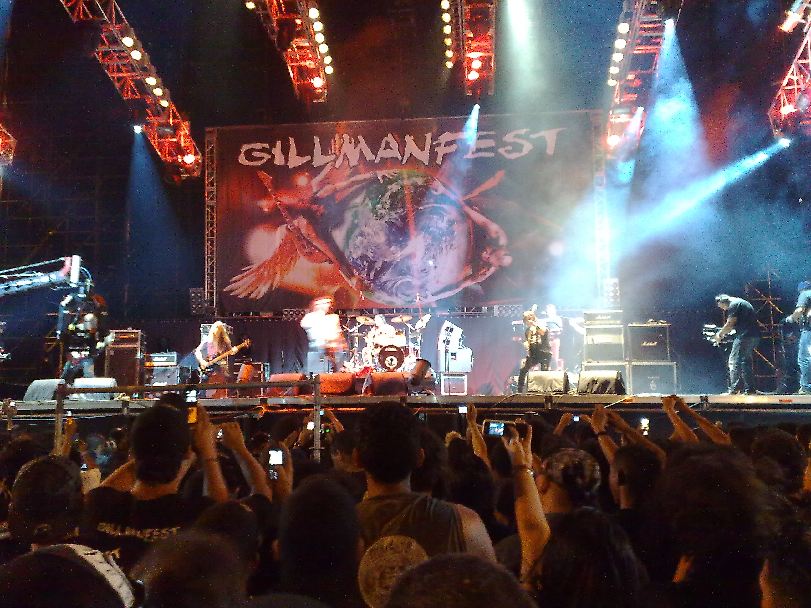 Gillmanfest Maracay 2010.